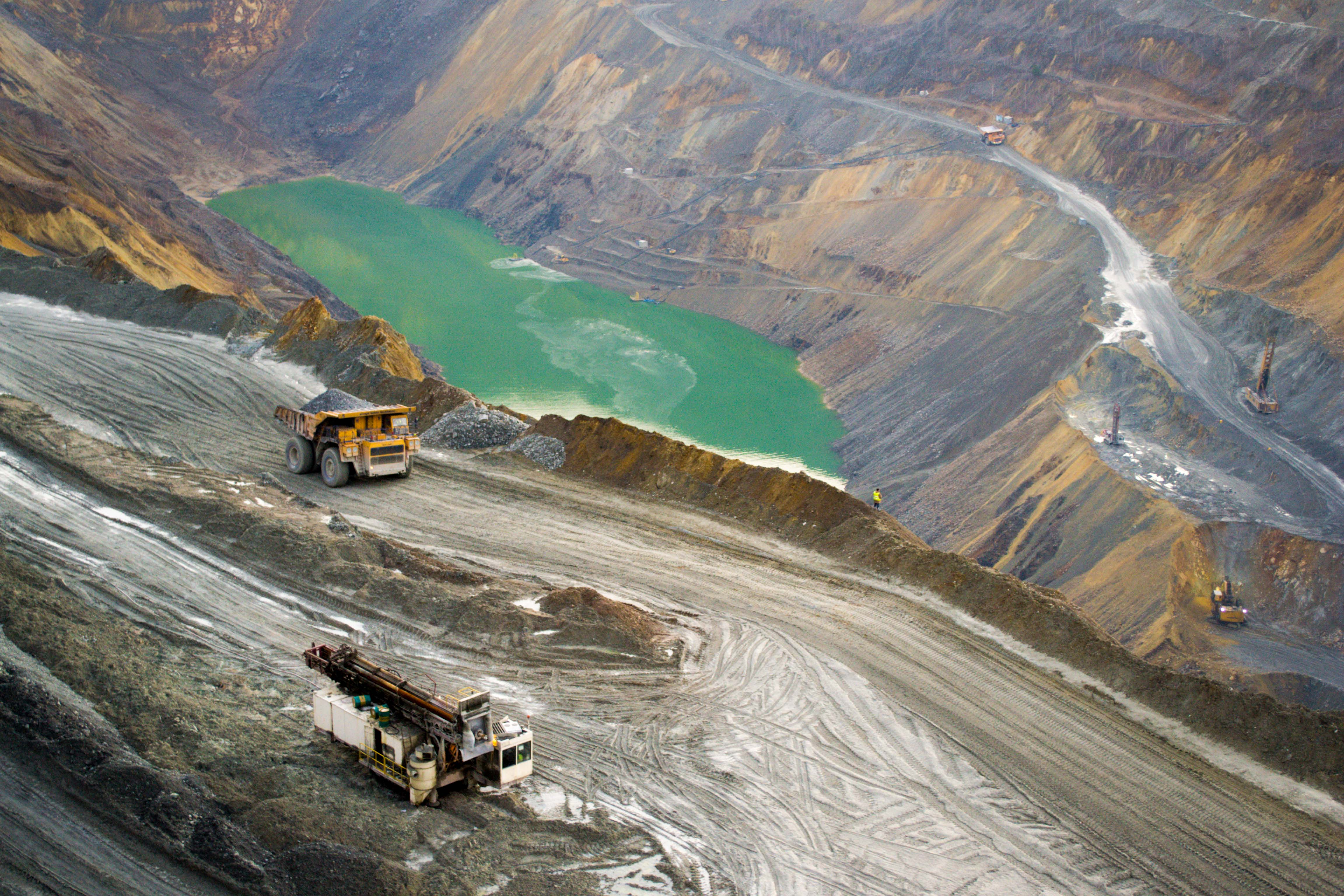 Јужни ревир сликано Јануара 2018.